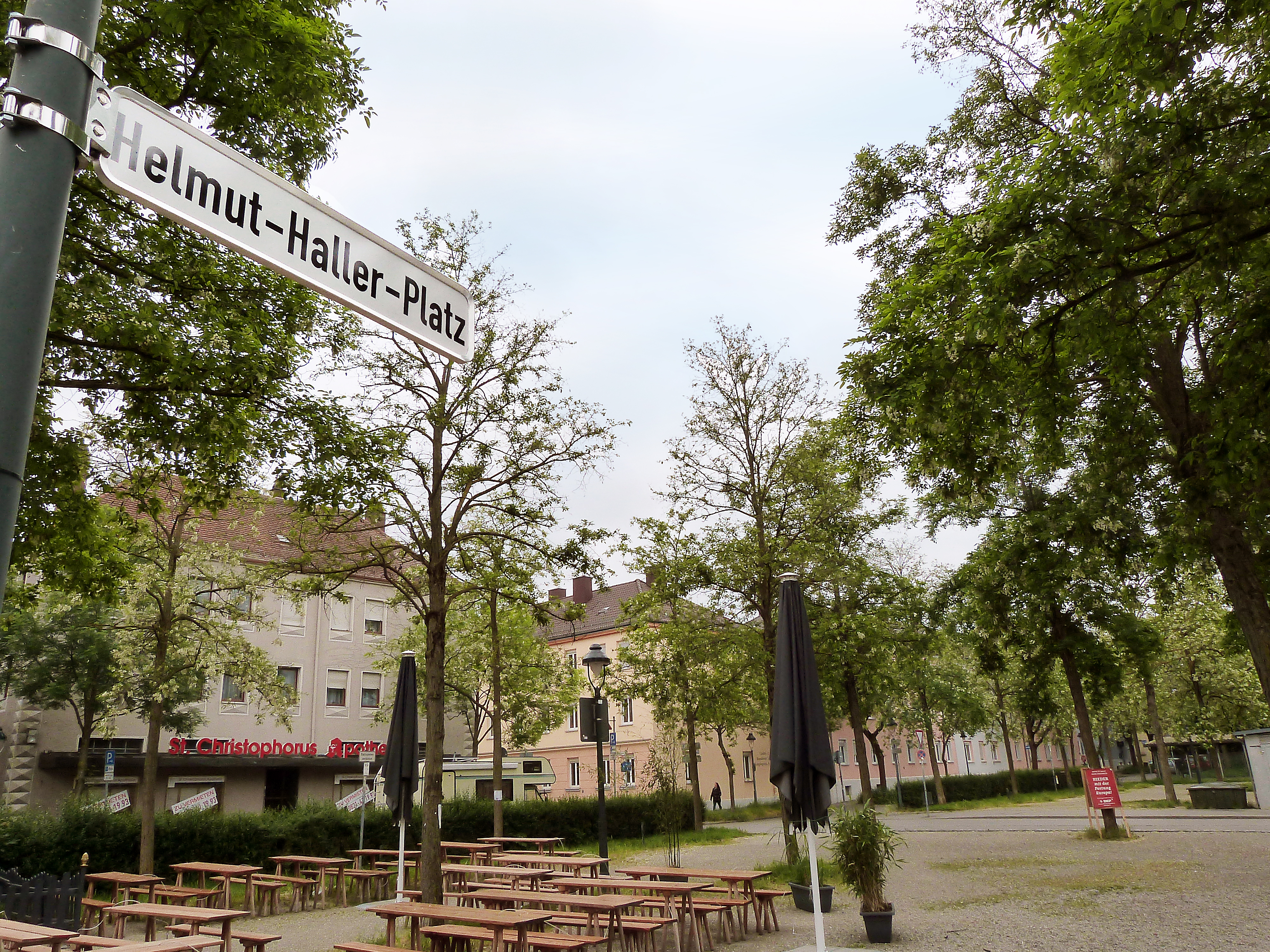 Gegenüber dem Helmut-Haller-Platz am Bahnhof Augsburg-Oberhausen liegt das Elternhaus des Augsburger Fußballidols. Es ist das rosafarbene Haus im Bildhintergrund.